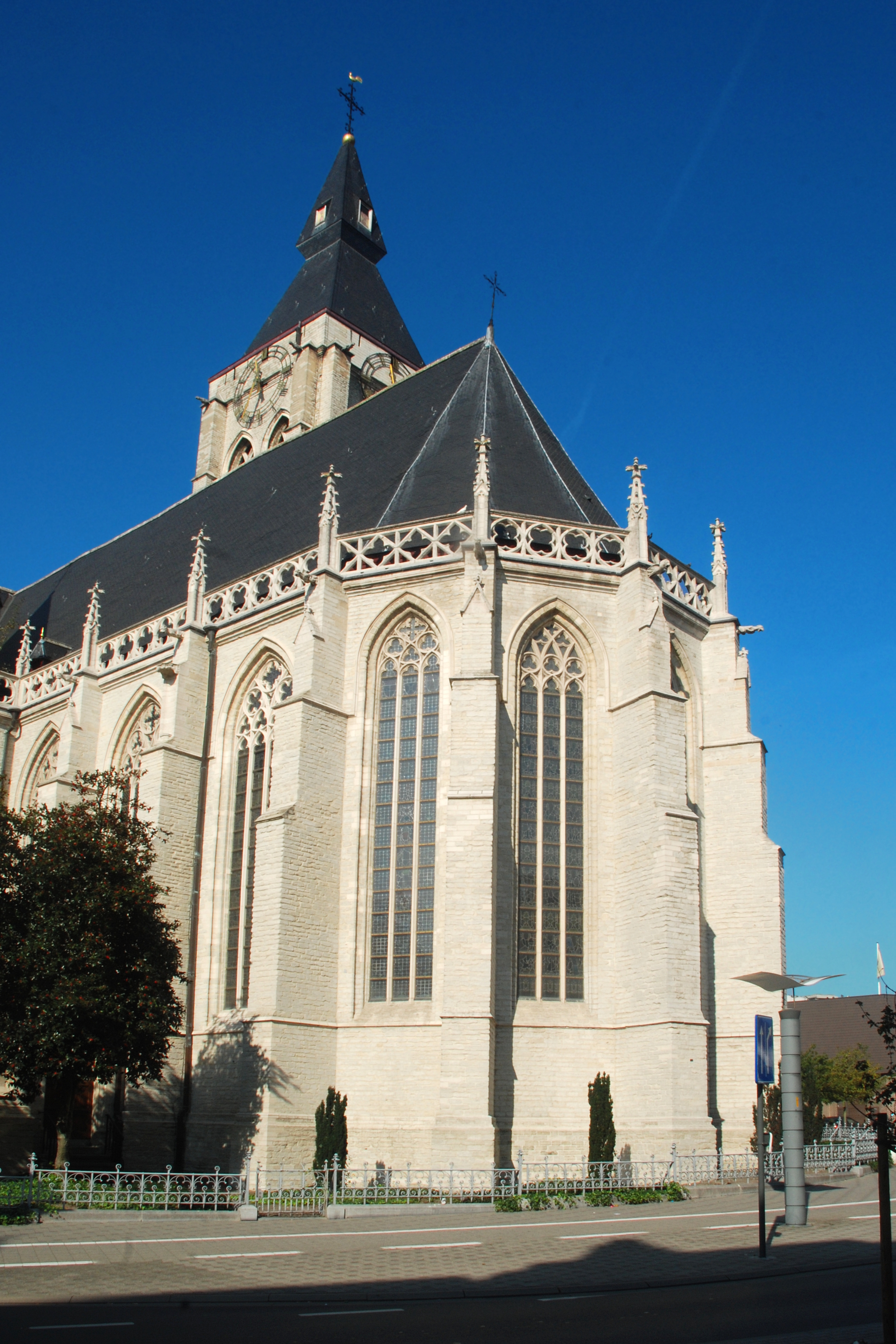 Belgique - Brabant flamand - Vilvorde - Église Notre-Dame de Bonne-Espérance